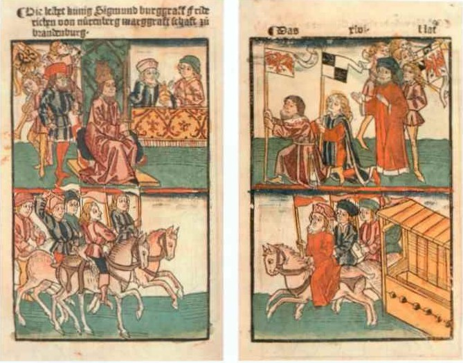 Frederik I krijgt de Mark Brandenburg als leen en wordt verheven tot keurvorst